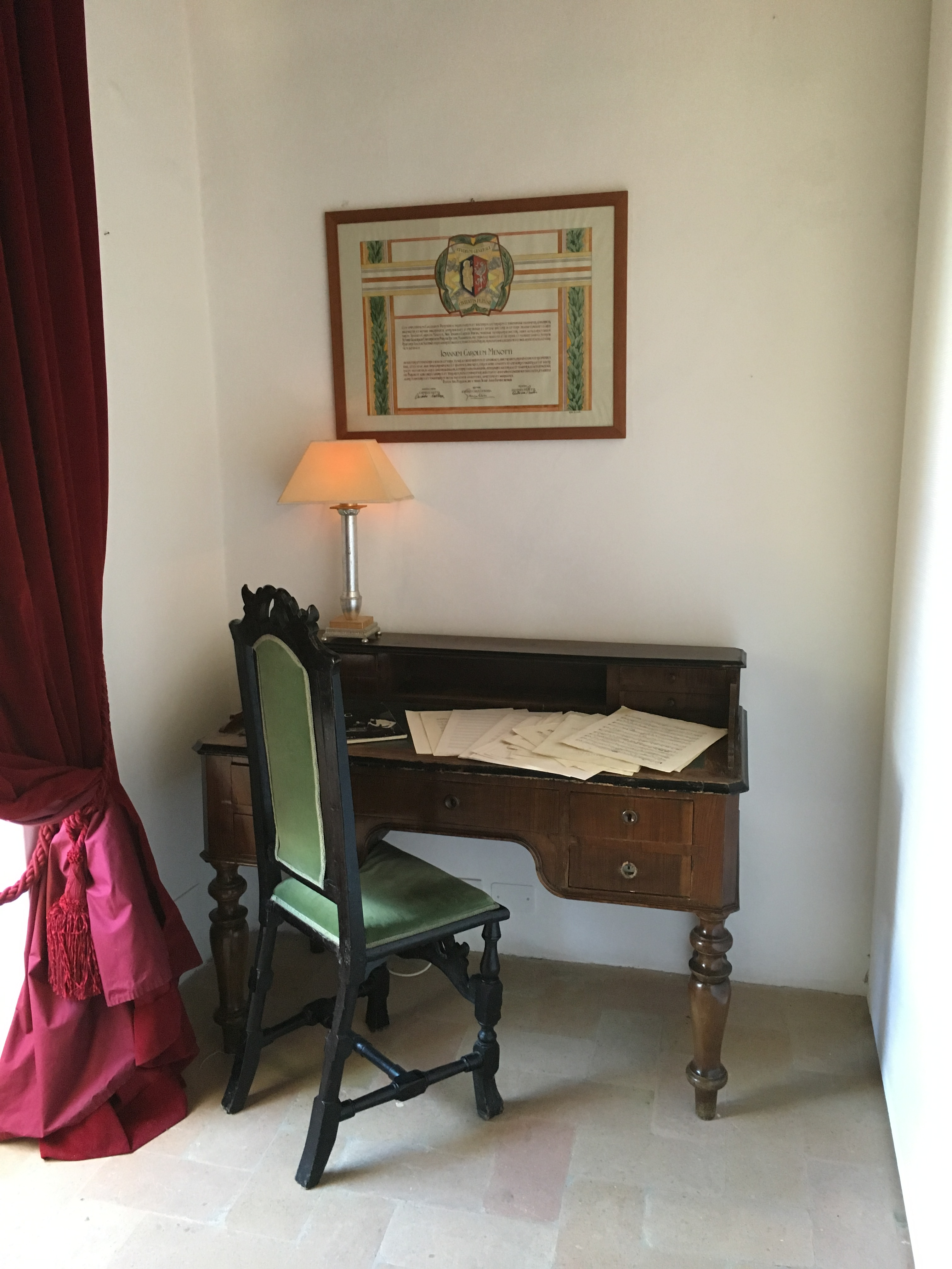 Casa Menotti Spoleto